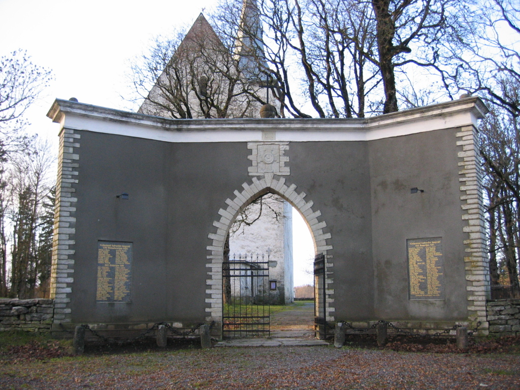 Märjamaa Vabadussõja malestusmärk